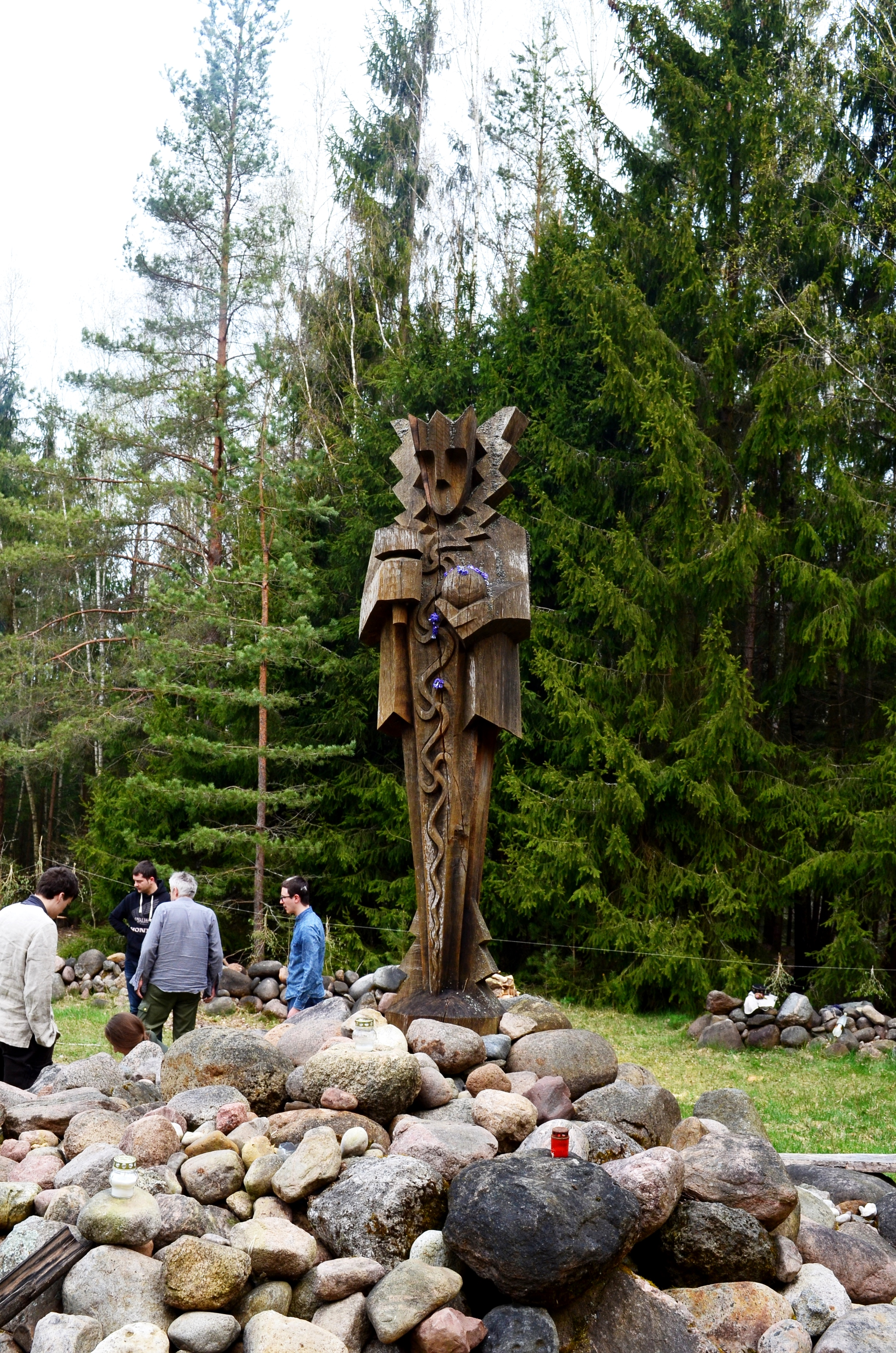 Perkūno šventykla Kulionyse, Molėtų raj.